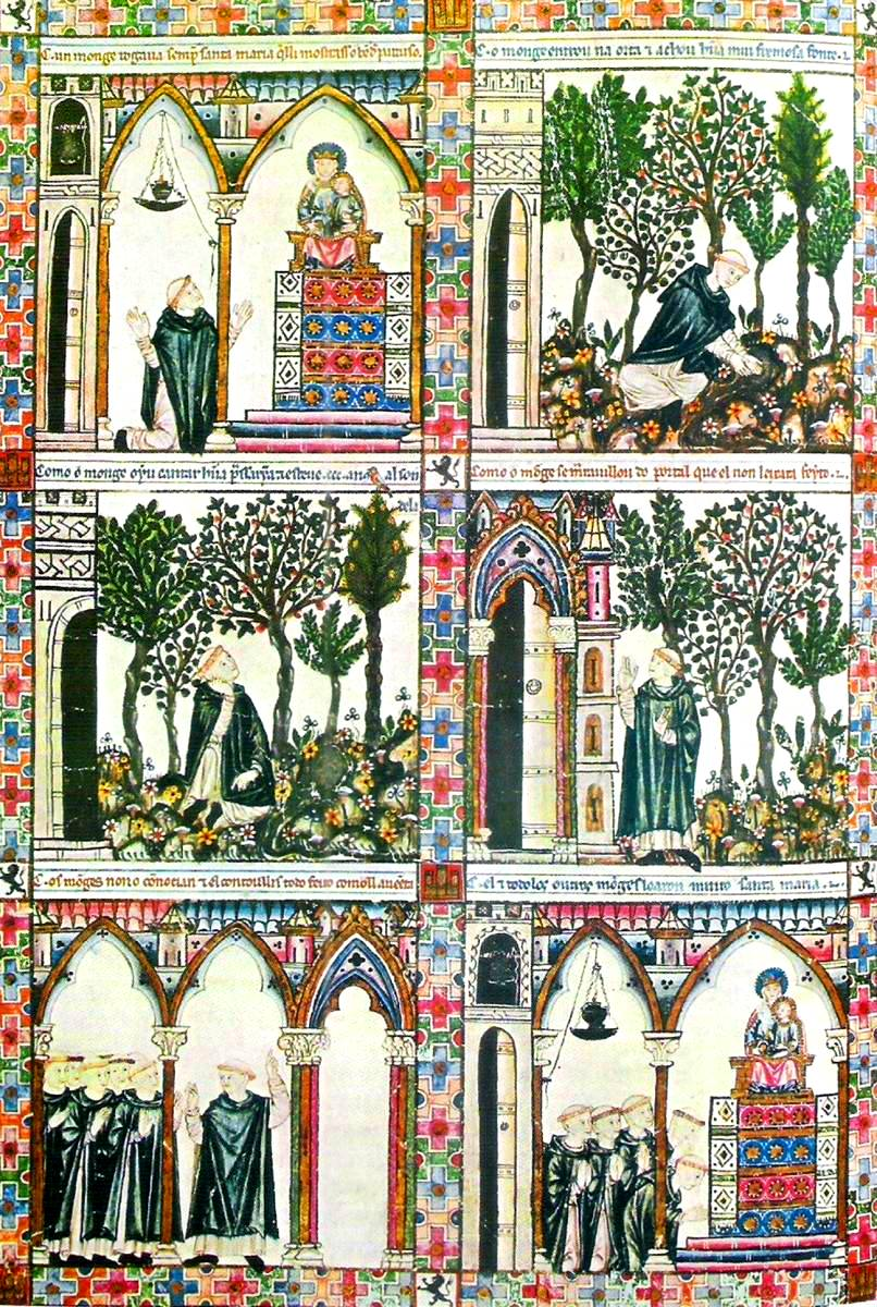 Cantigas de Santa María. Cantiga 103.